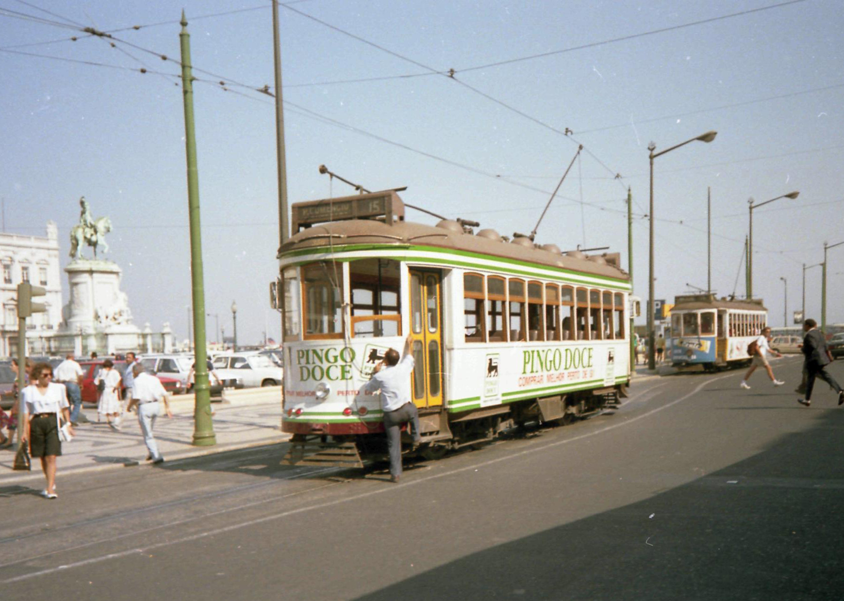 Photo: Feltz Prise en 1989 Ligne 15, direction ESTADIO Praca do Comercio Tram 356 de la série 343-362. A ce jour, la place du Commerce à bien changé, plus de voitures et plus de trams à cet endroit